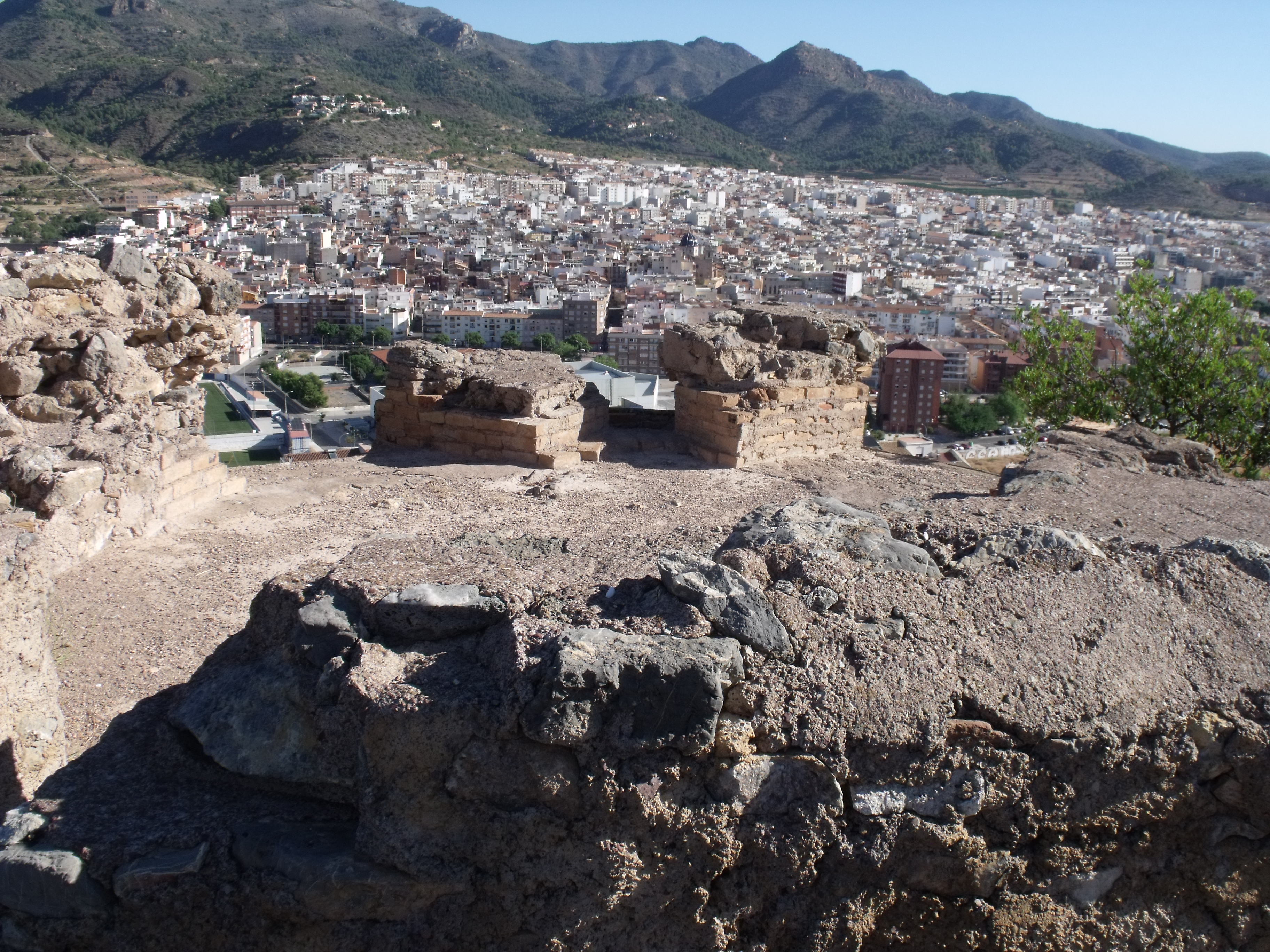 Vall de Uxó vista desde una posición de la Línea XYZ.